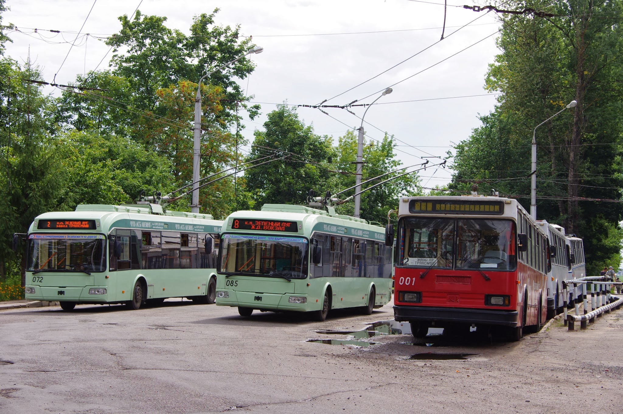 Зелёный Луг, Могилёв, Belarus